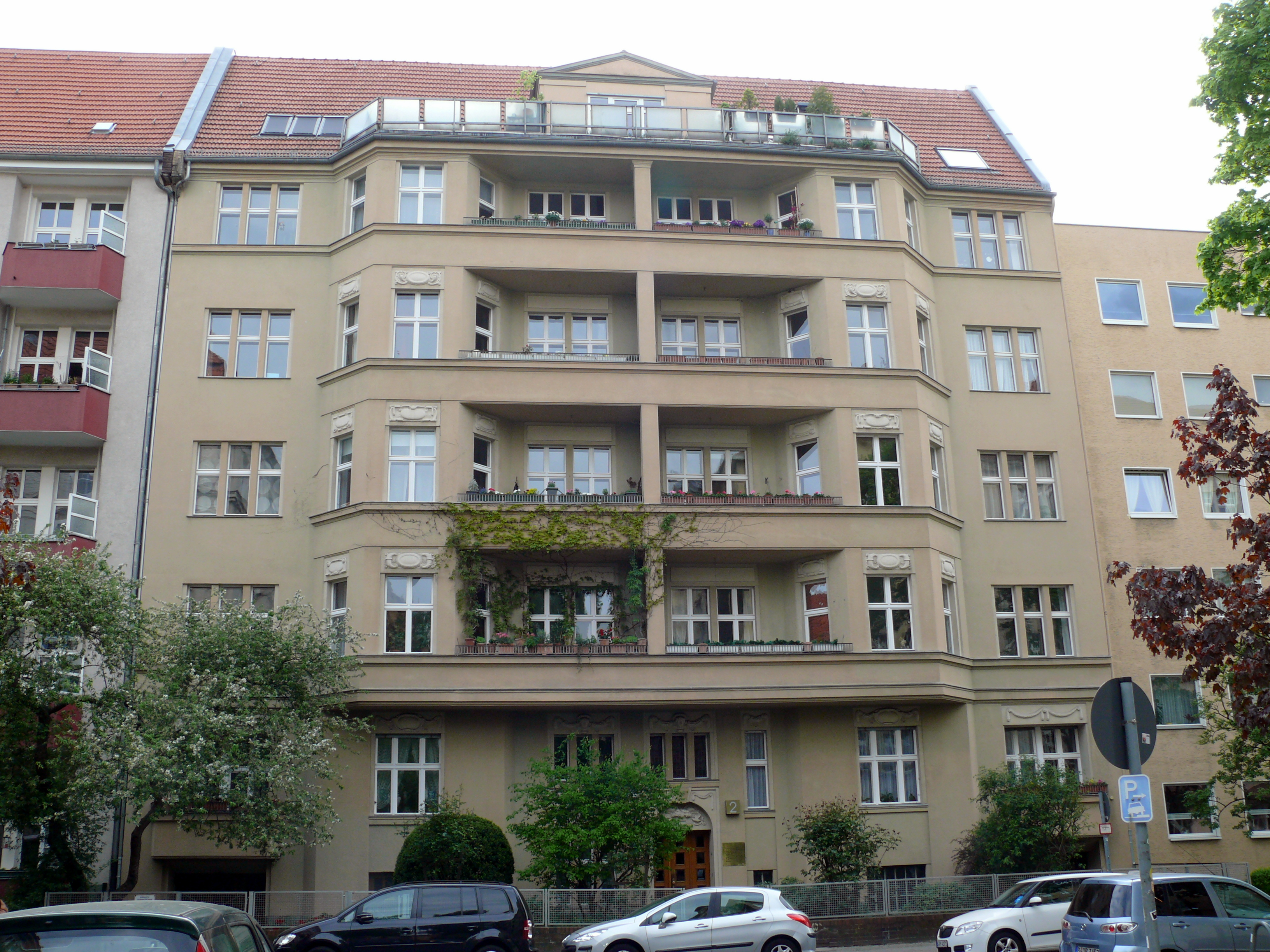 Berlin-Tempelhof Schulenburgring 2